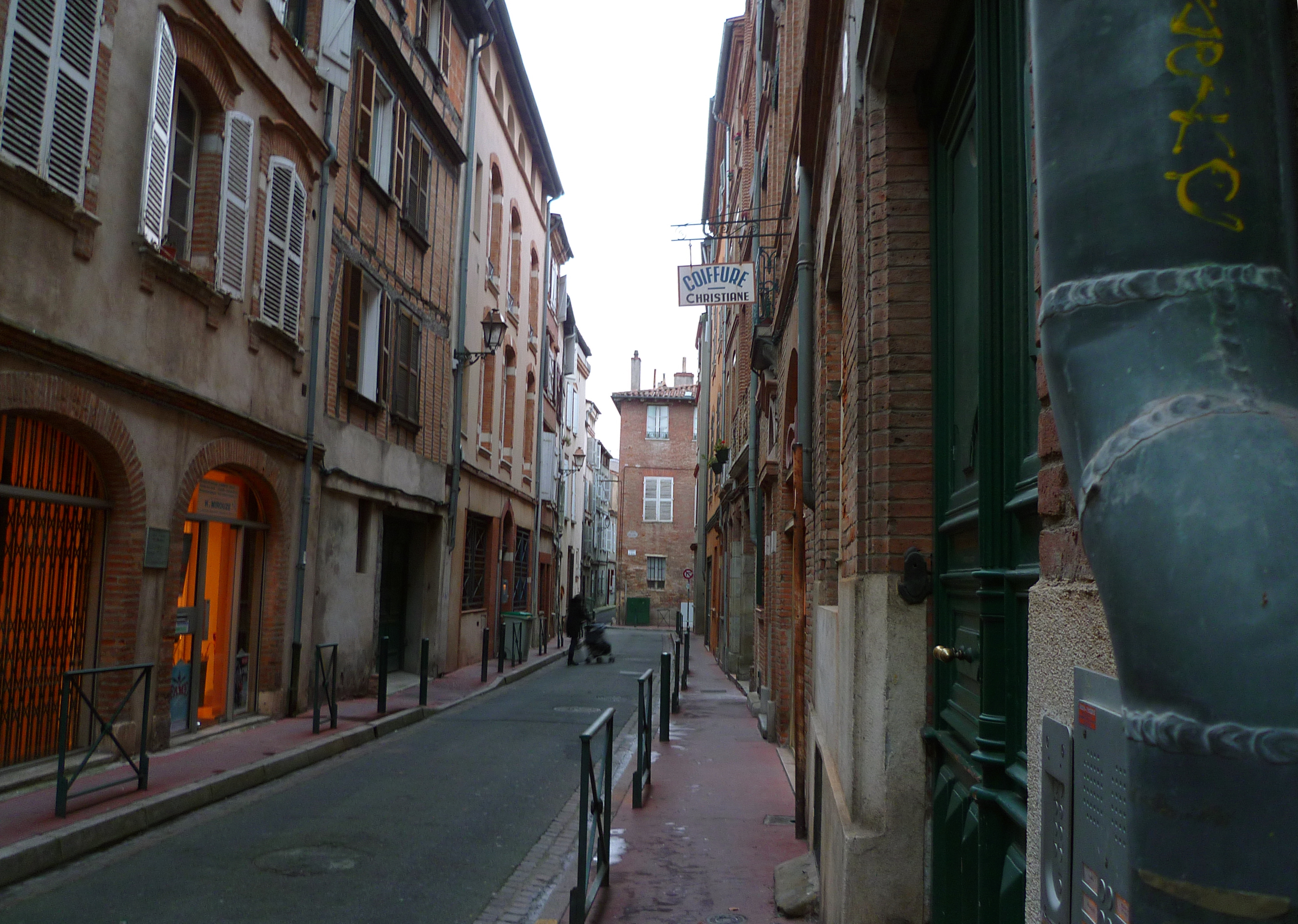 La rue Montoulieu Velane à Toulouse (Haute-Garonne, Midi-Pyrénées, France).